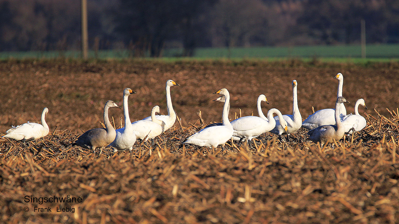 Singschwäne auf einem abgeernteten Feld.